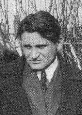 В день похорон Владимира Маяковского 17 апреля 1930 года. Слева направо: М. Файнзильберг, Е. Петров, В. Катаев, С. Суок-Нарбут, Ю. Олеша, И. Уткин. Во дворе Клуба писателей.